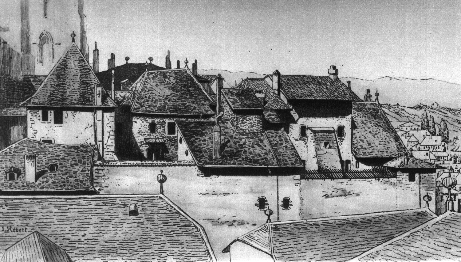 Genf, Bischöflicher Hof